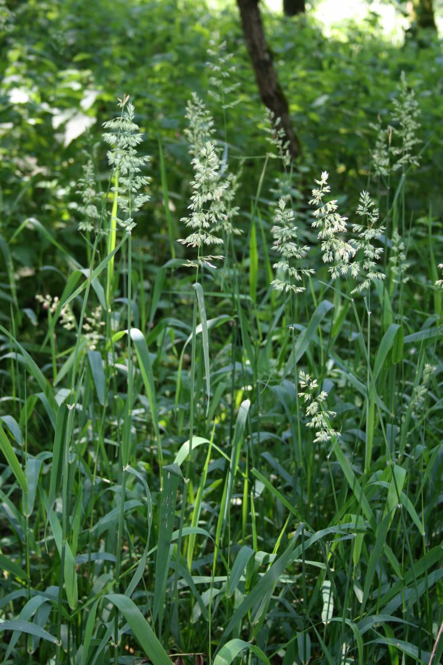 Rohr-Glanzgras (Phalaris arundinacea), Süßgräser (Poaceae) - Österreich/Austria/Autriche: Oberösterreich, Hausruckviertel, Niederholzham N Schwanenstadt